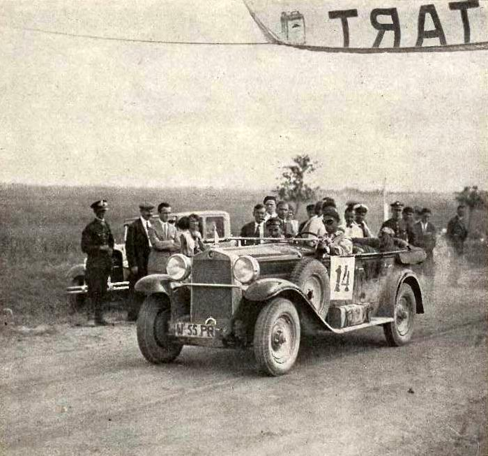 Rajd Polski 1930 - Zwycięzca w kategorii samochodów turystycznych Zygmunt Rahenfeldt w samochodzie Fiat 525